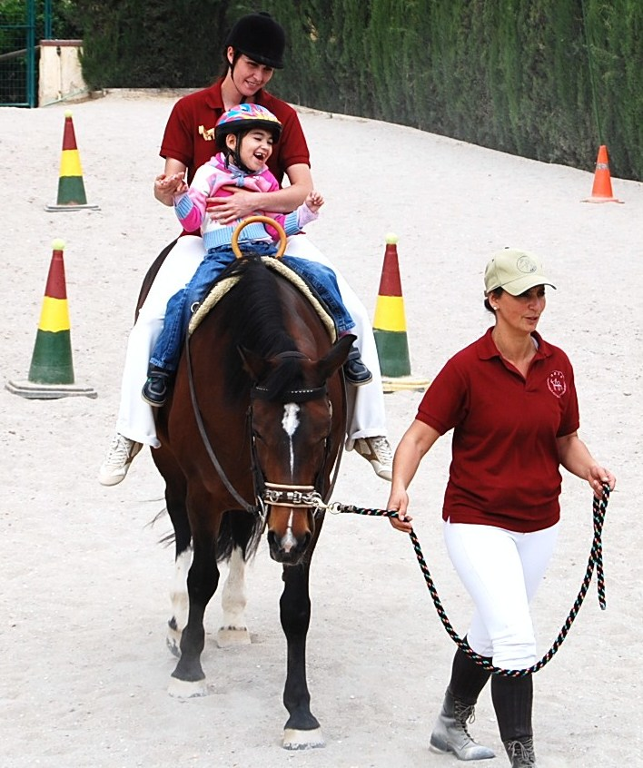 Interacción con el caballo